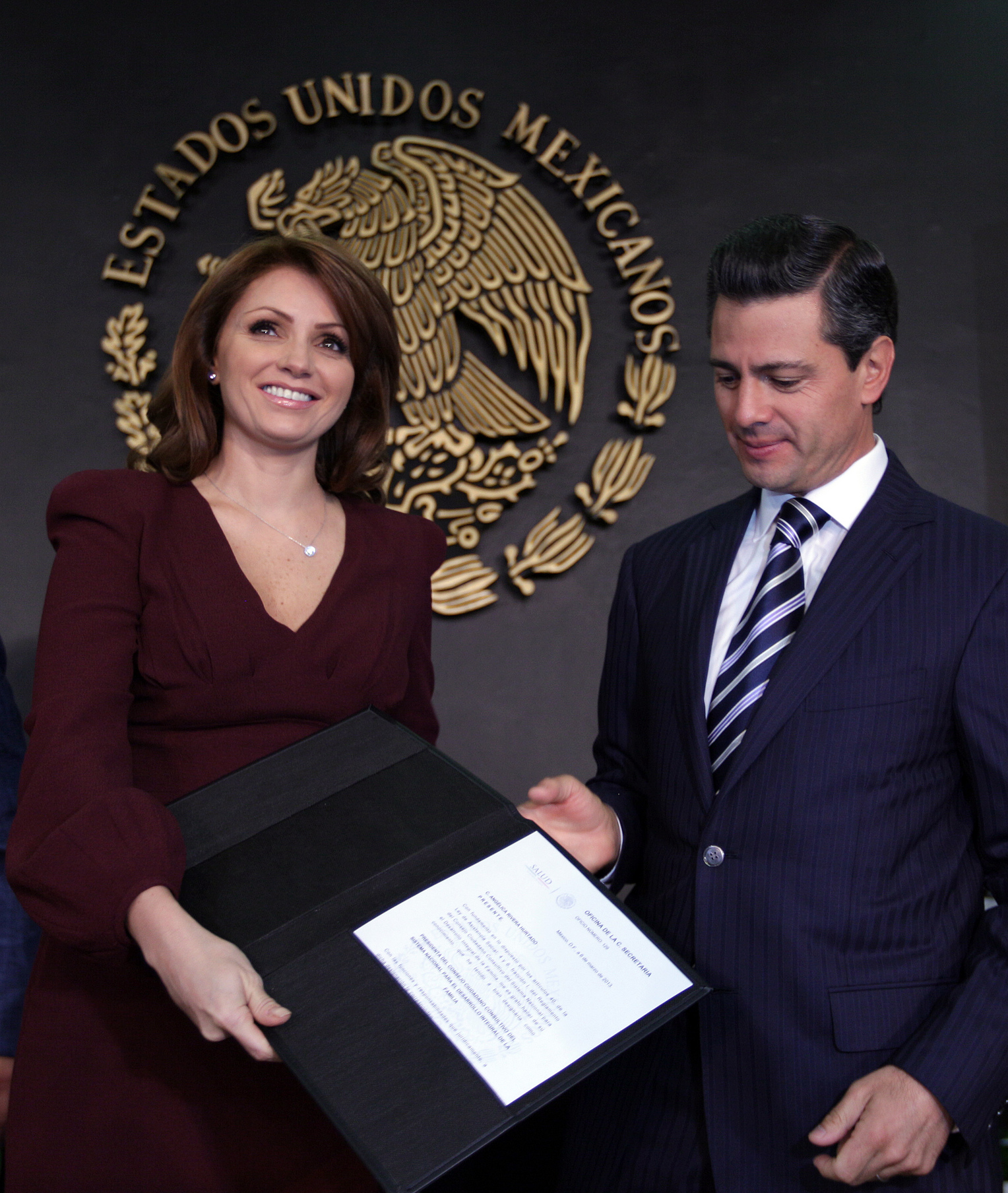 Angélica Rivera y Enrique Peña Nieto. Nombramiento de la Presidenta del Consejo Ciudadano Consultivo del Sistema Nacional DIF. Residencia Oficial de Los Pinos. 06 marzo 2013